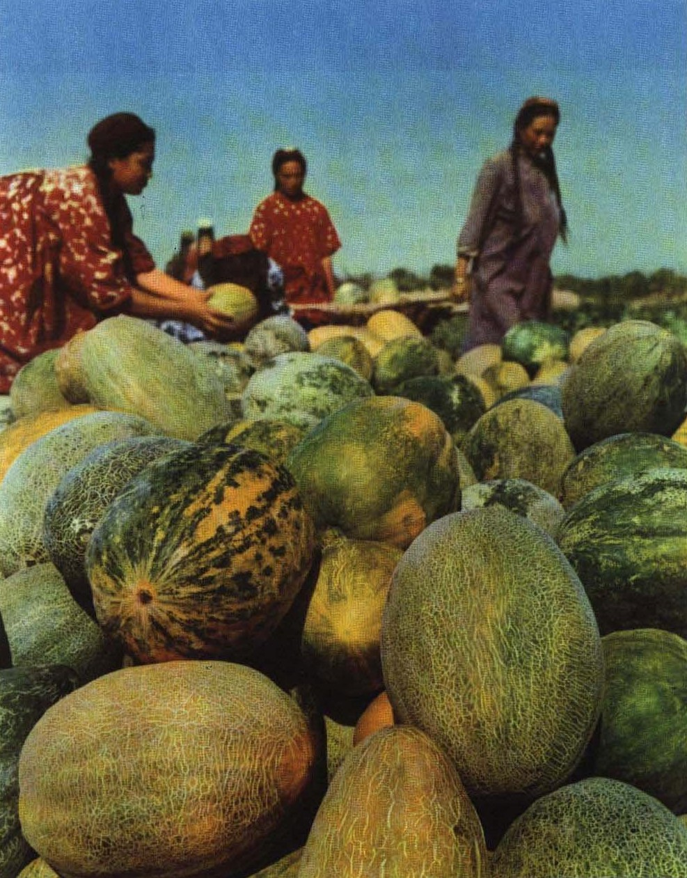 1965-10 1965年 新疆哈密瓜